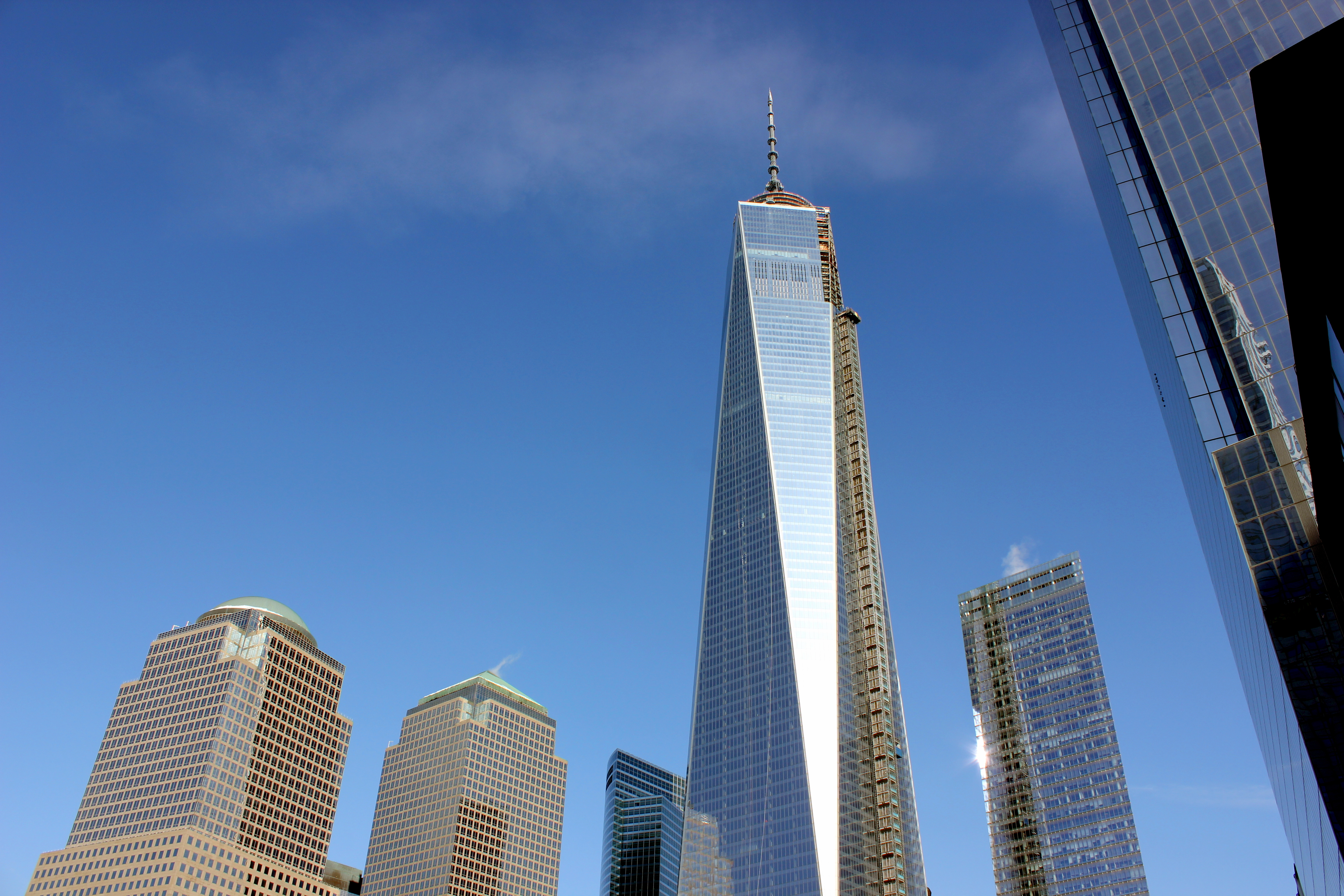 One World Trade Center, New York City